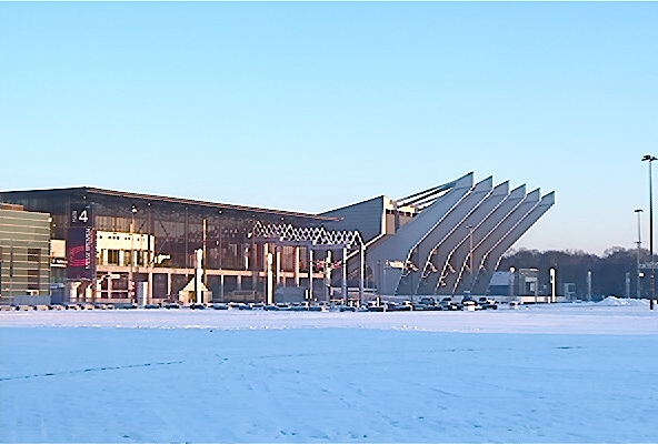 Südwestansicht der Stadthalle Bremen in der Ursprungsversion von 1964, auf der Bürgerweide in Bremen, Deutschland. Links das 1993 eingeweihte Congress Centrum Bremen.